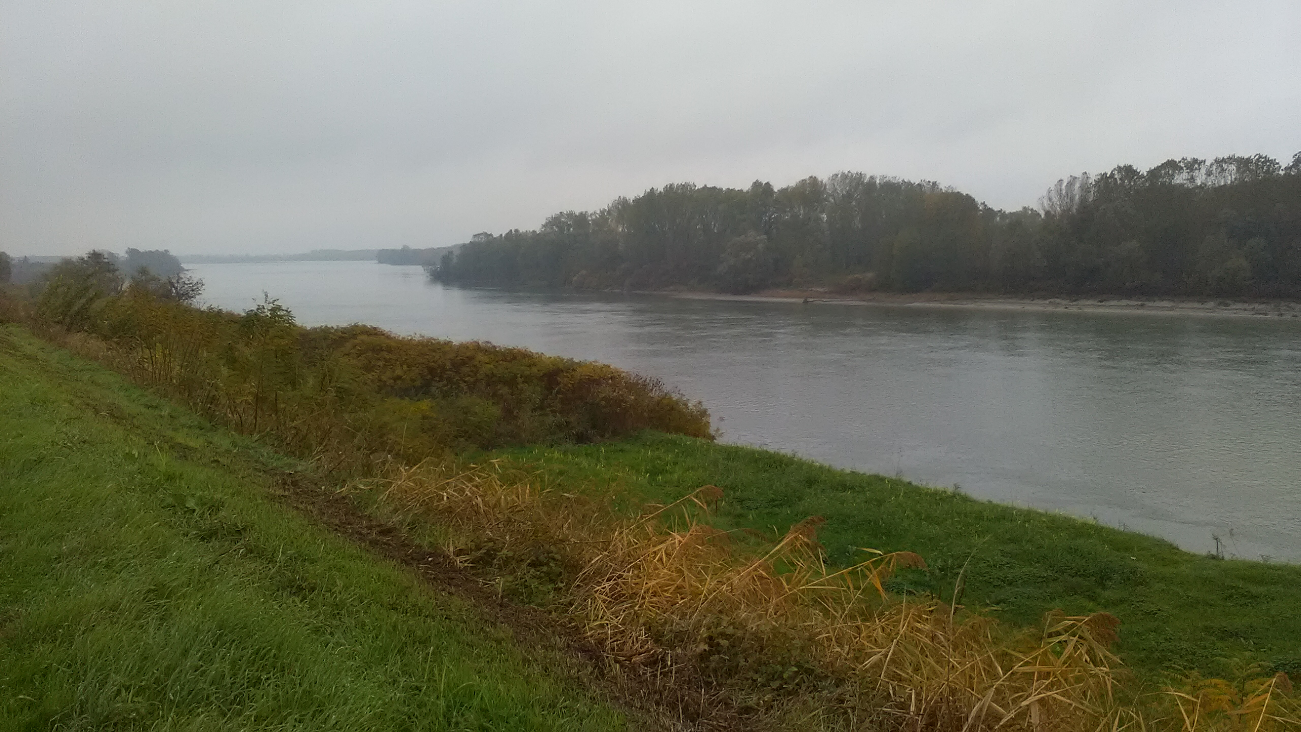 Fiume Po a Castelmassa